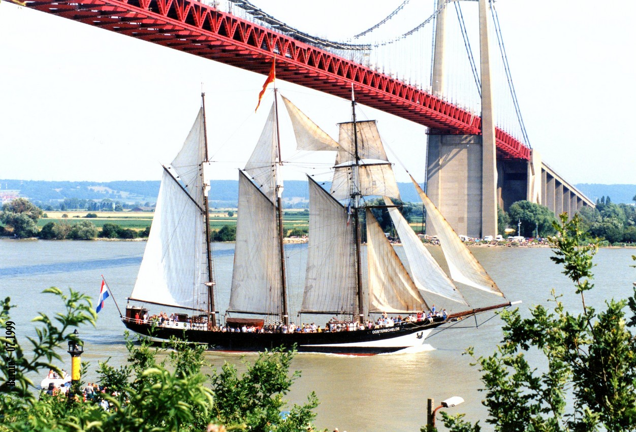 Passage de ce voilier type Goélette , de 1918 construite au Pays Bas , lors de l'armada du Siècle de Rouen en 07.1999.. Passage en dessous du Pont de Tancarville .. (Cette Armada fut succès incroyable avec plusieurs millions de spectateurs ) . Photo Argentique